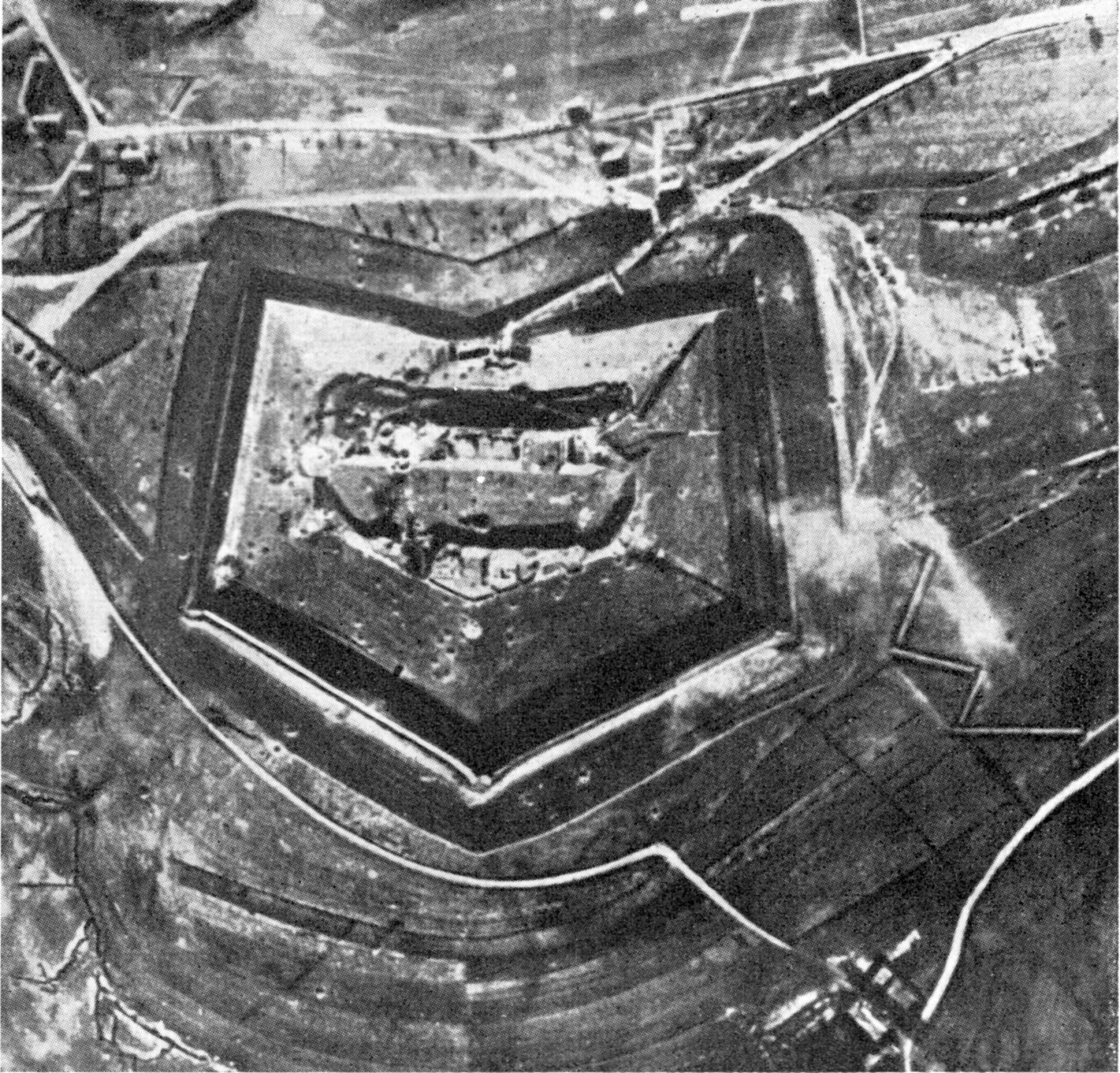 Fort Doaumont 1916